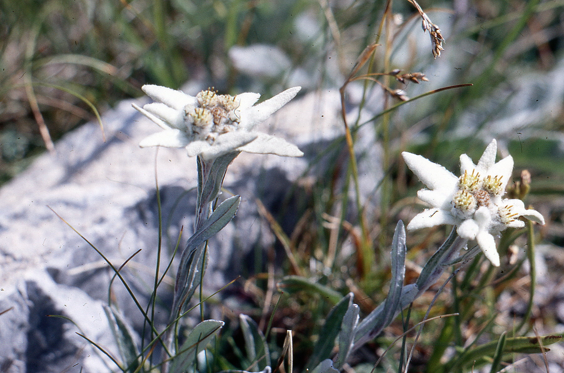 Edelweiß, Asteraceae, Deutschland, Oberbayern, Berchtesgaden Photo: U.Schmidt, 1986